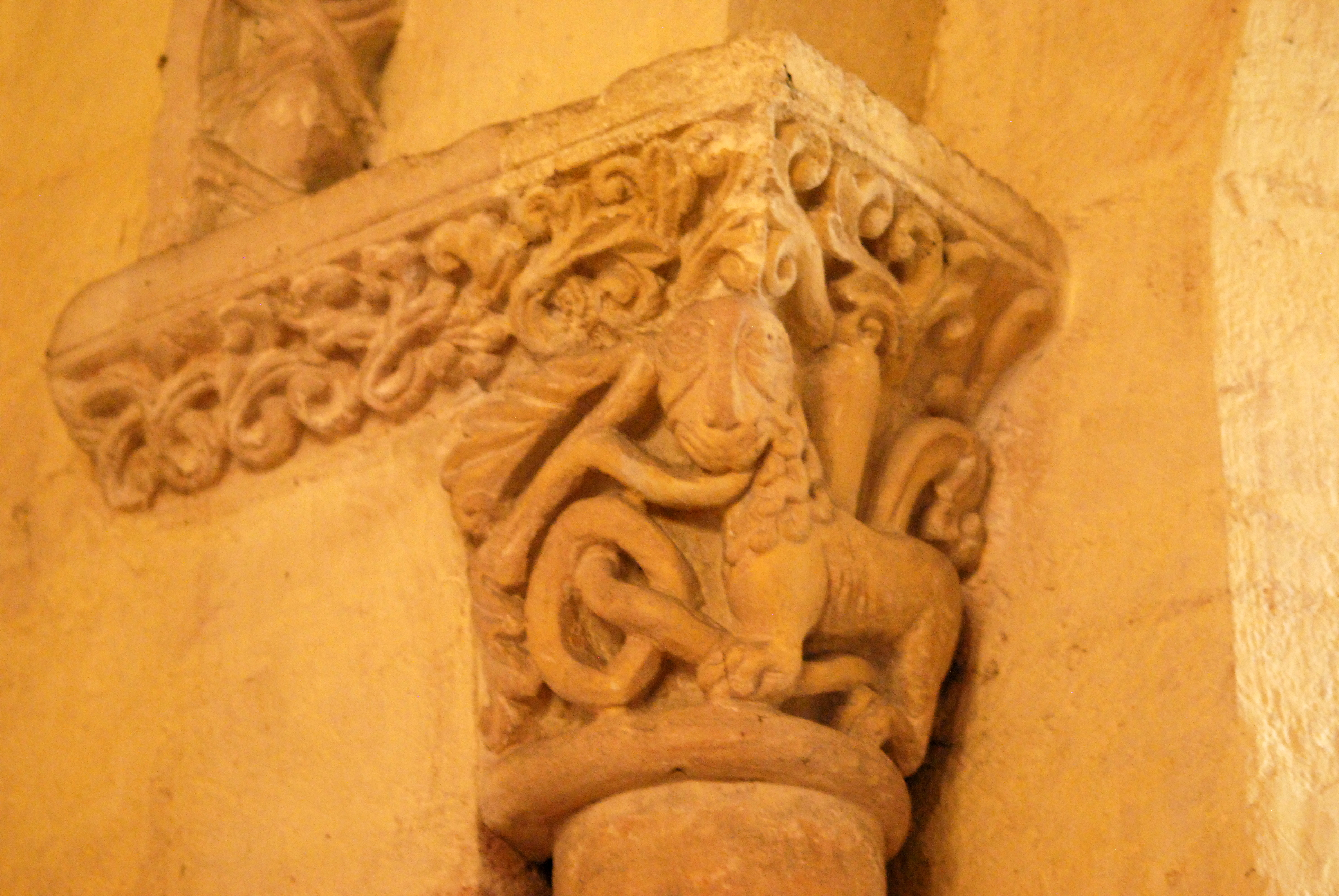 Targon église St Romain